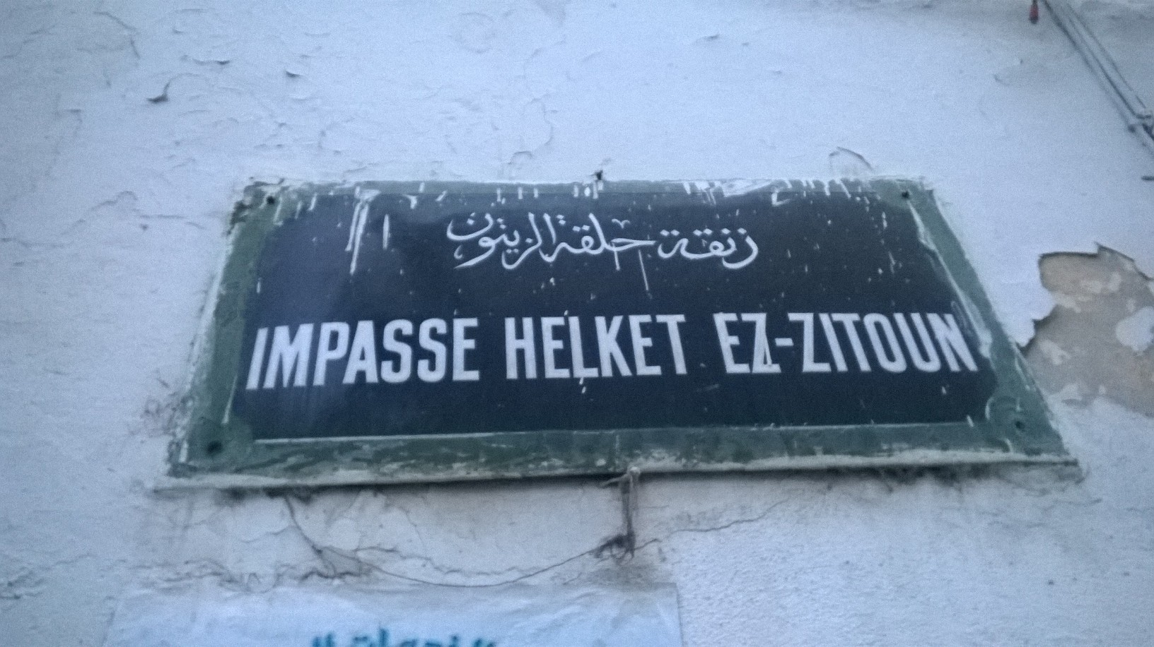 La médina de Tunis مدينة تونس العتيقة